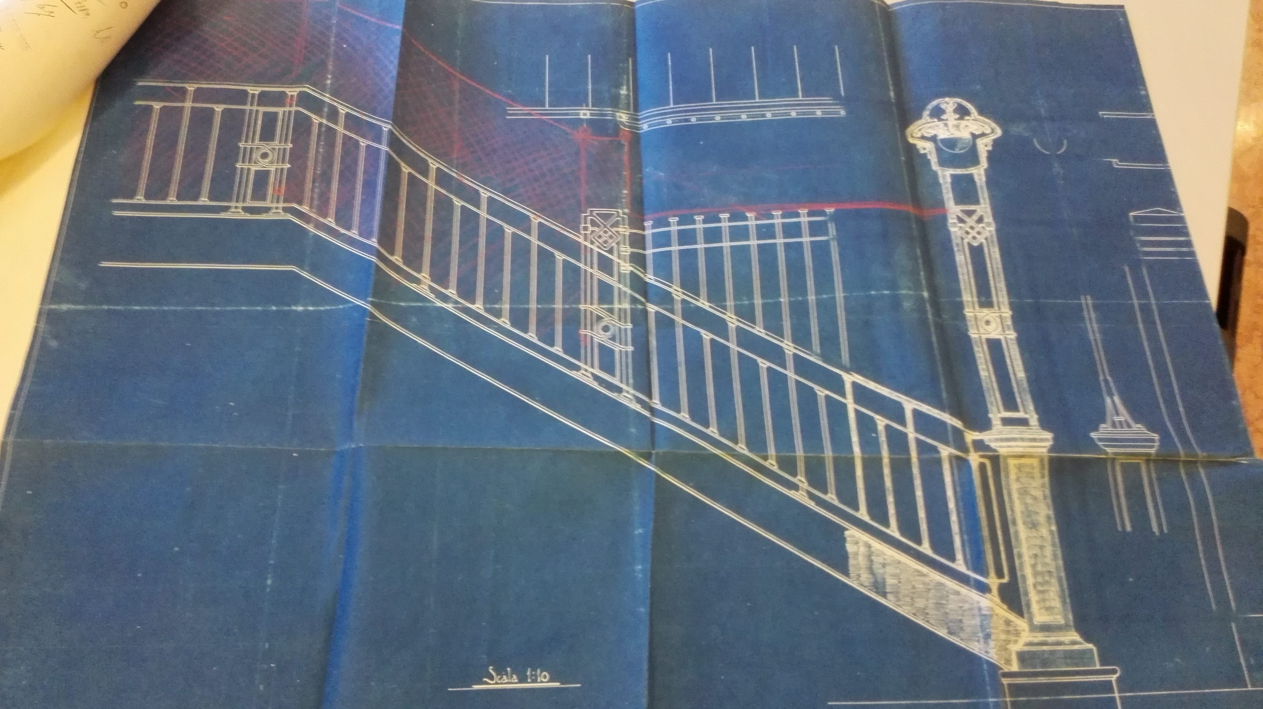 Disegni originali del ponte nei primi del 900